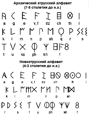 Архаический и новоэтрусский алфавиты